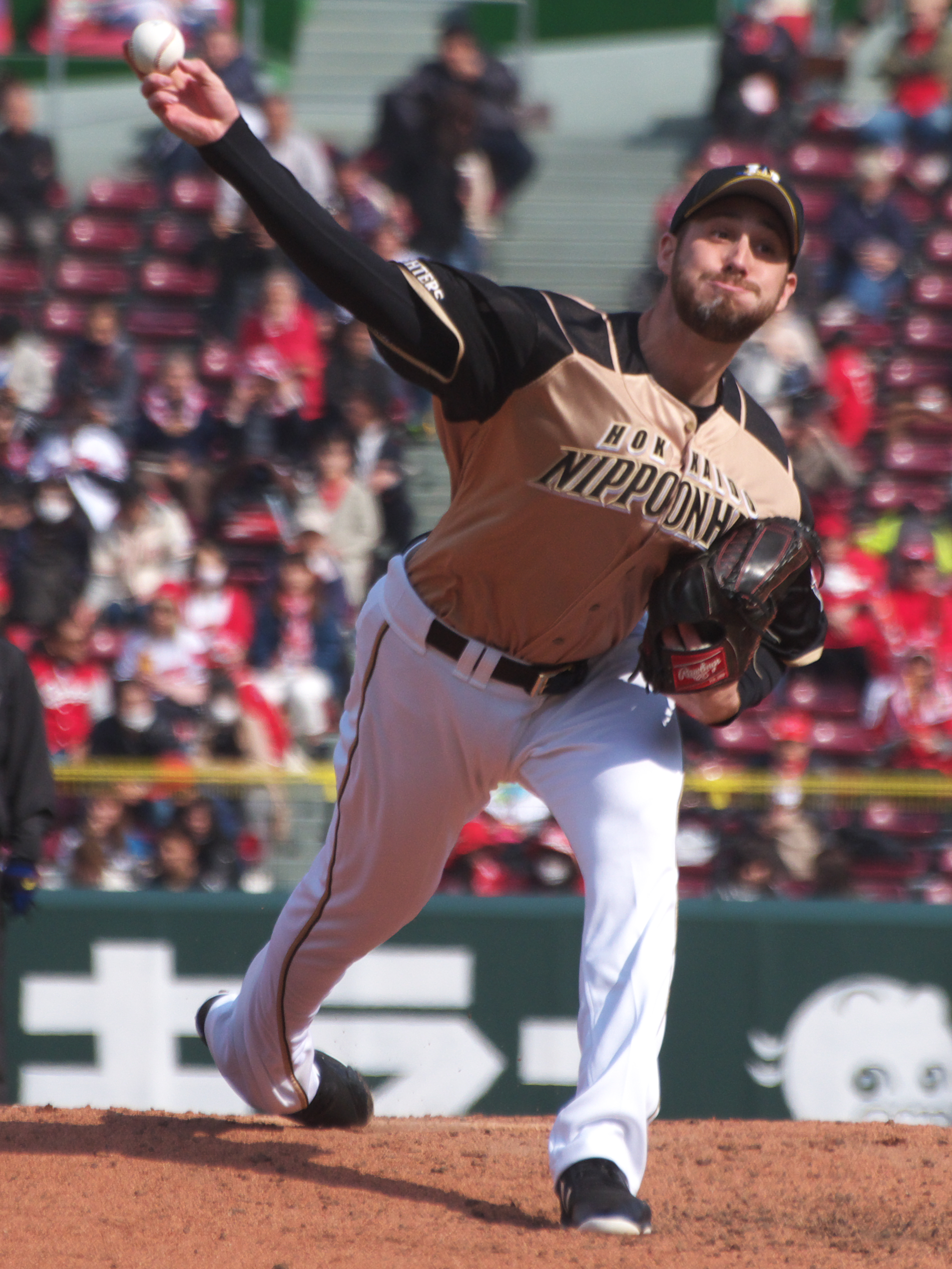 北海道日本ハムファイターズ ジャスティン・ハンコック